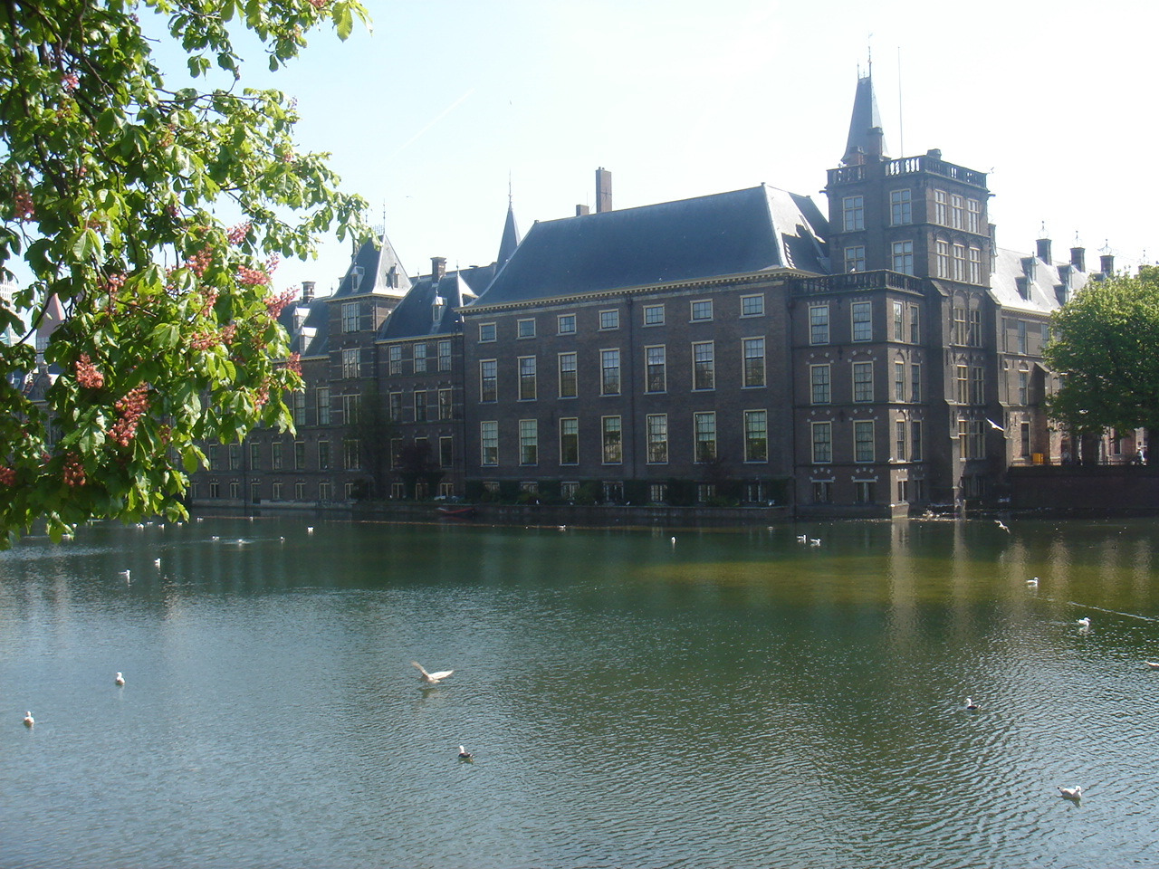 The Binnenhof in Den Haag.